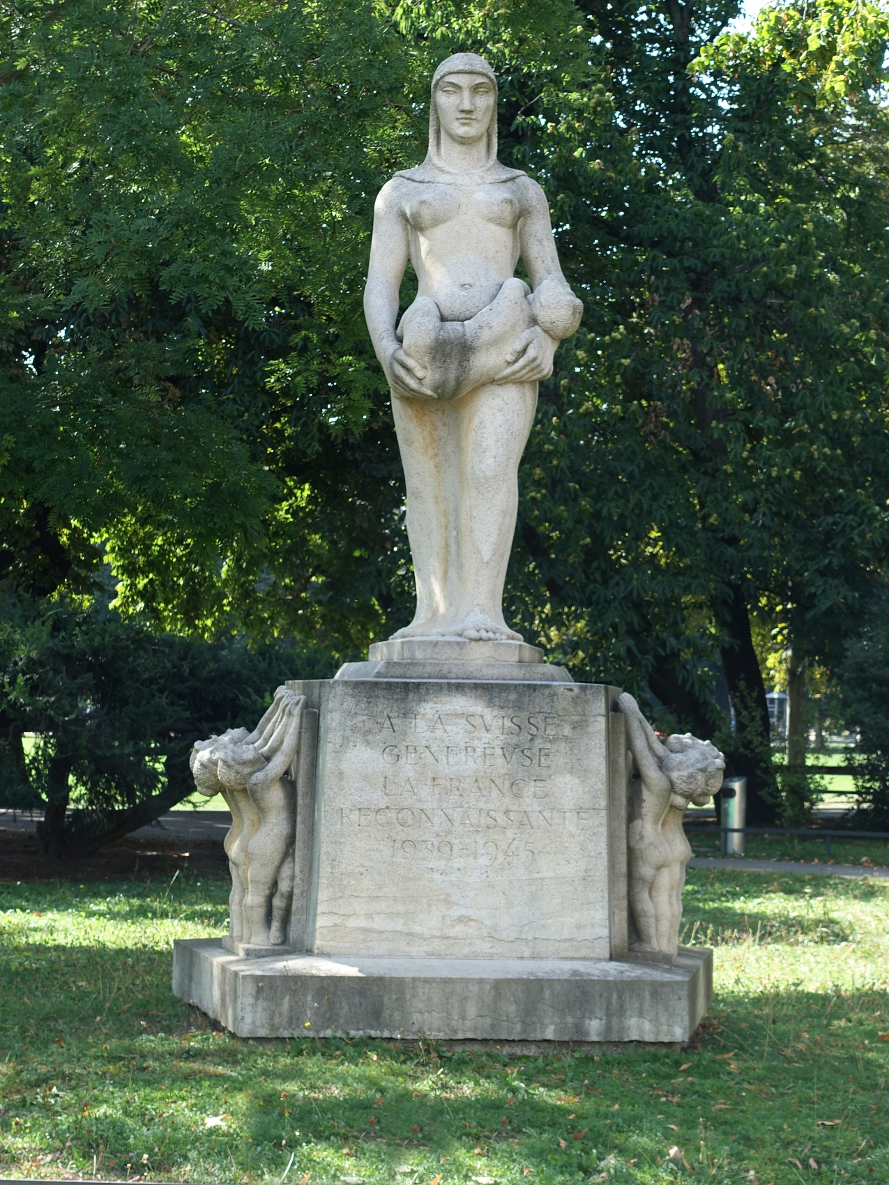 Das Denkmal der Dankbarkeit in Basel steht am Spalenring gegenüber dem ehemaligen Schützenhaus auf dem Schützenmattpark. Das Denkmal wurde am 27. Juni 1948 eingeweiht und trägt die Inschrift: "A la Suisse généreuse, la France reconaissante / 1939-1945" (Das dankbare Frankreich, der grosszügigen Schweiz / 1939–1945). Zur Einweihung waren zahlreichen Behördenvertreter u.a. Regierungspräsident Peter Zschokke (1898–1986) und Édouard Herriot (1872-1957) Präsident der französischen Nationalversammlung, anwesend.